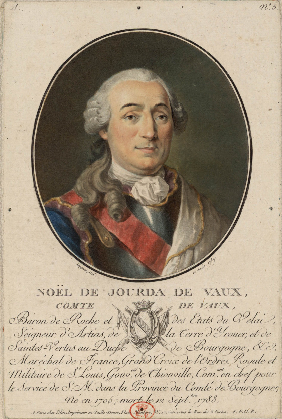 Noël de Jourda de Vaux, comte de Vaux, maréchal de France (1705-1788)